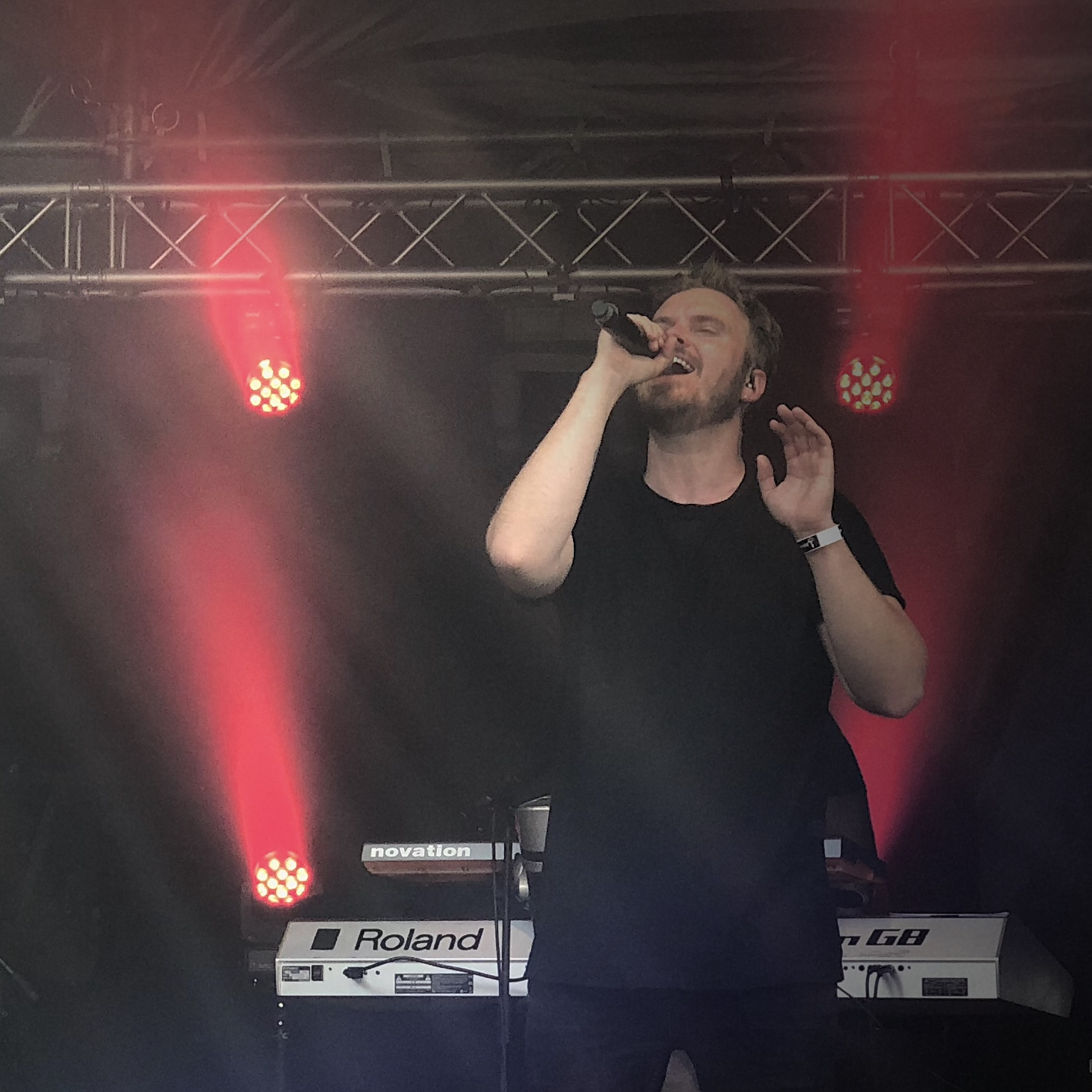 Parkfeest 2018 (Oosterhout NB)